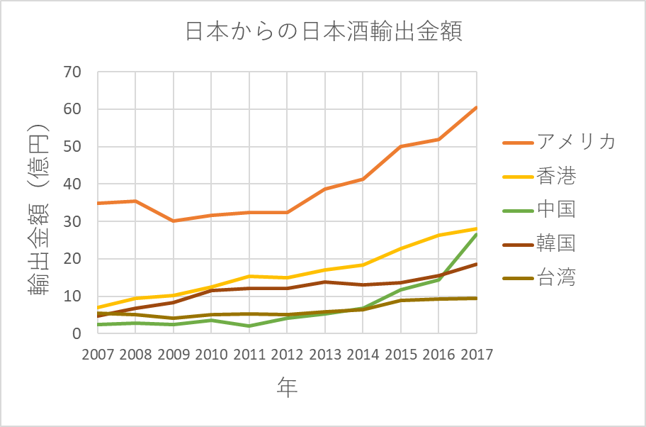 JETRO日本酒輸出ハンドブックのデータをもとにExcelで作成